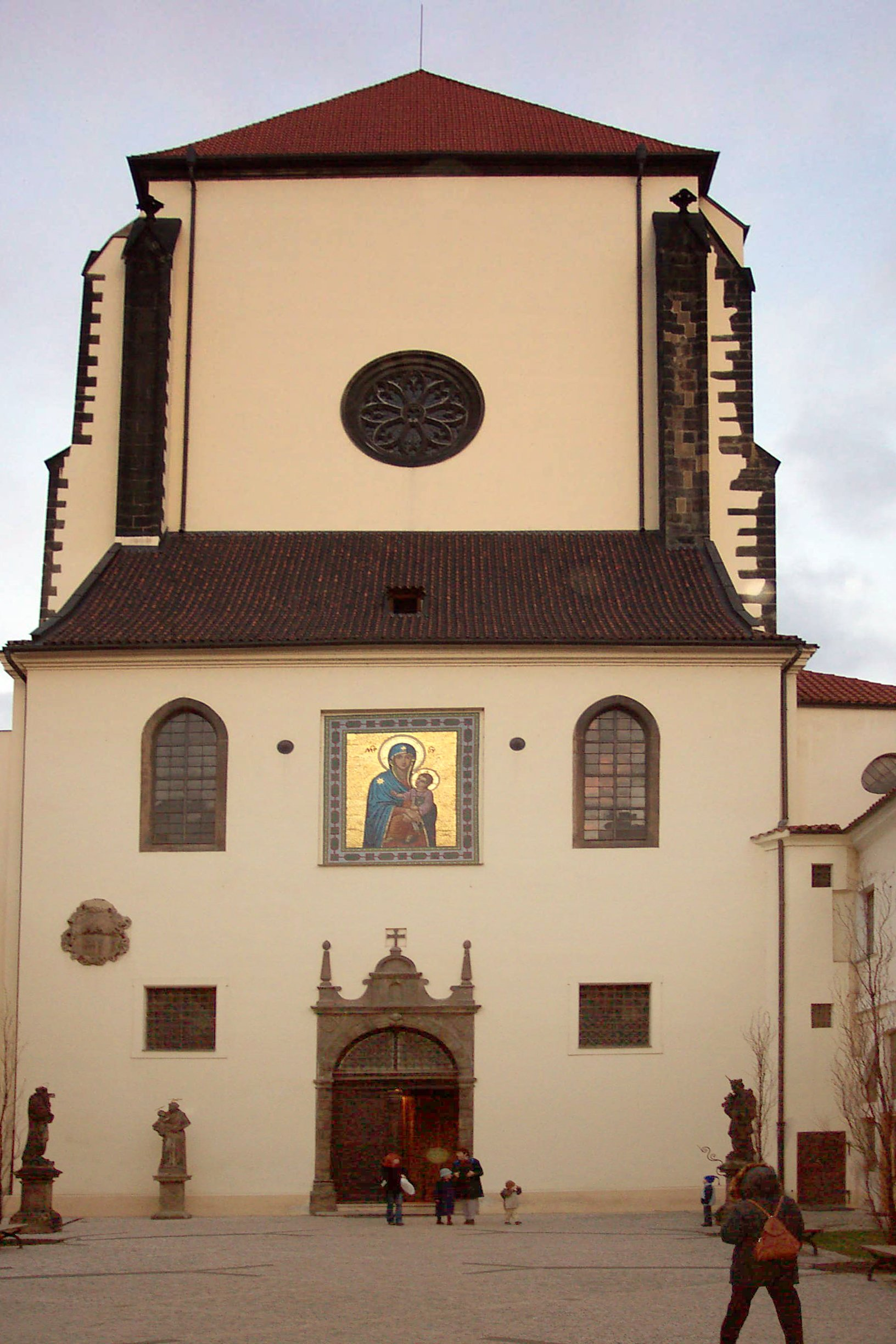 Kostel Panny Marie Snezne